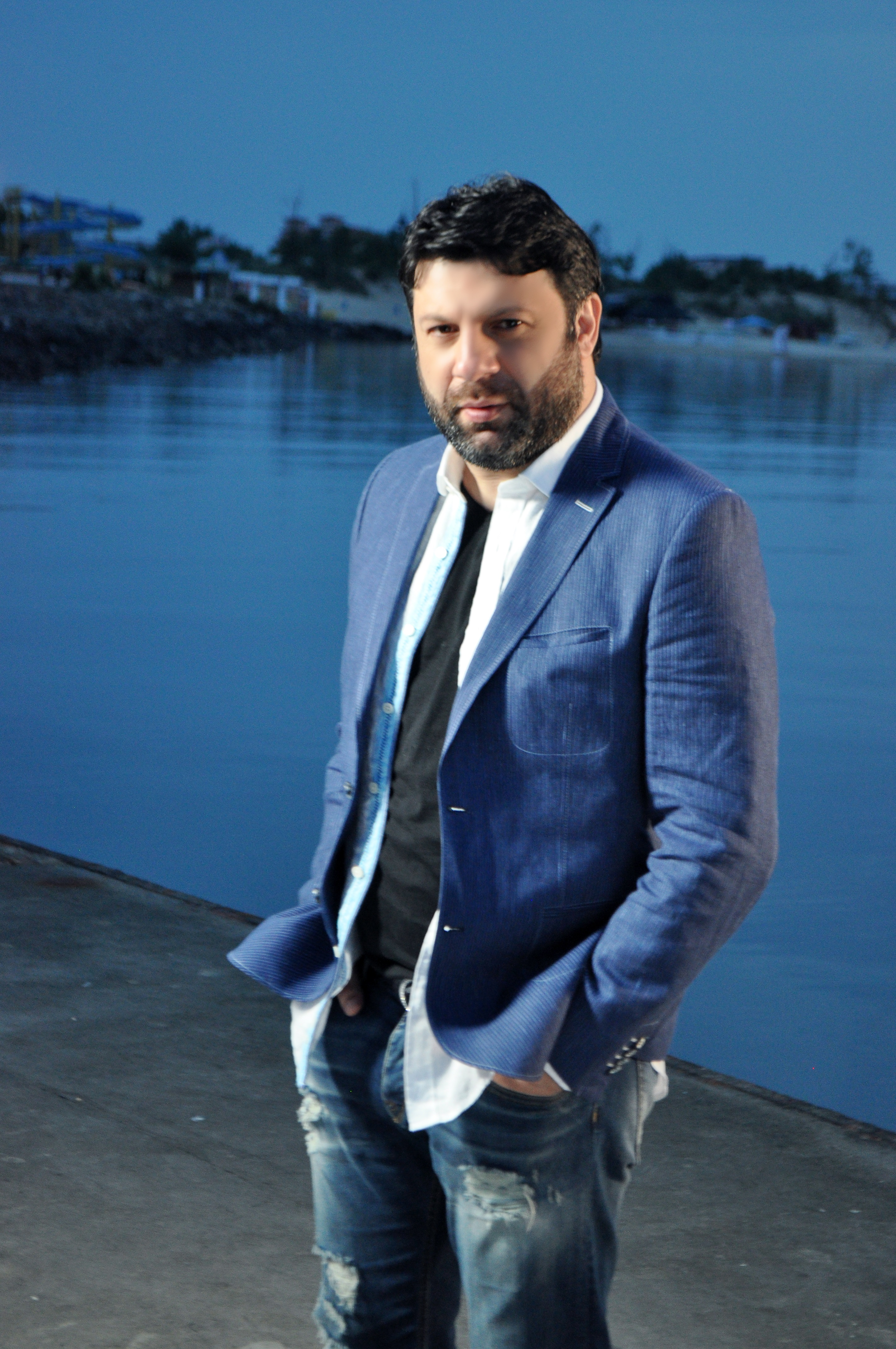 Снимка от най-новия клип на Тони